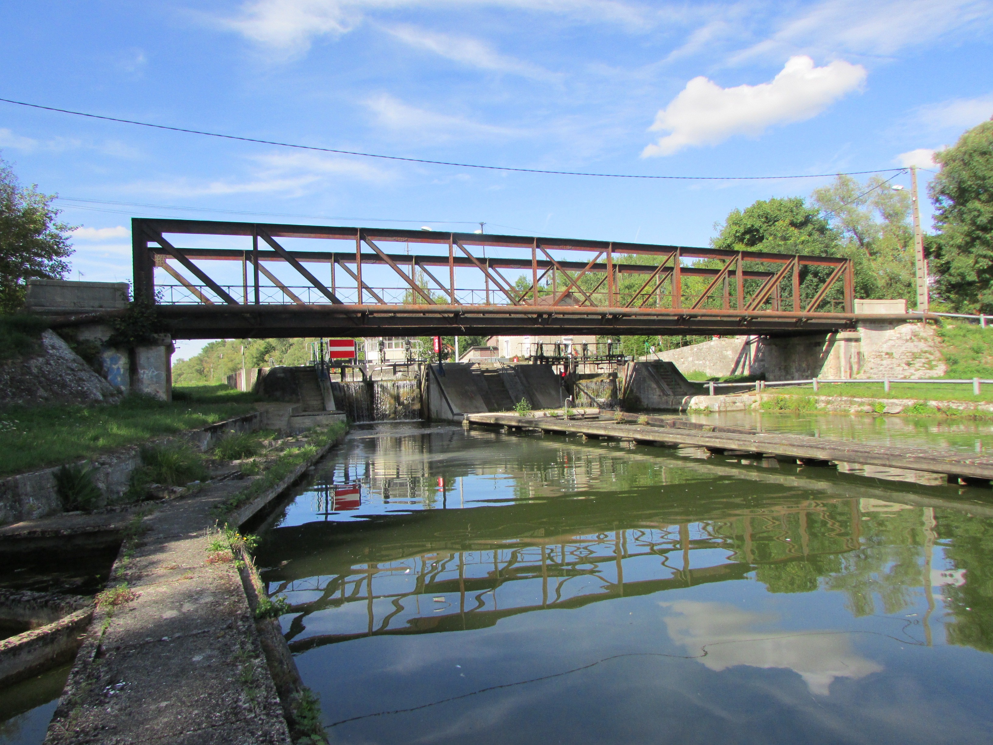 Vurede l'écluse n° 20